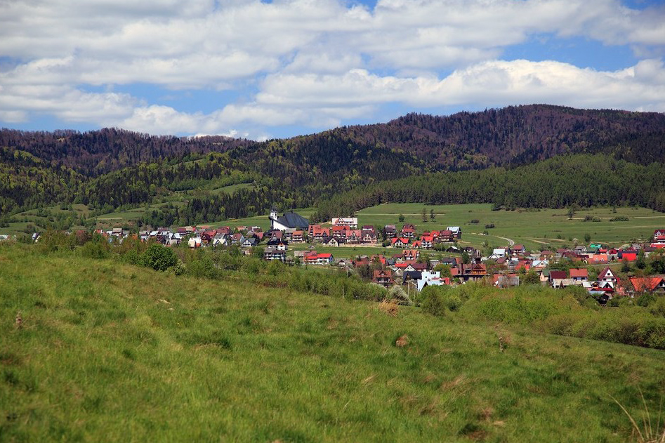 Kluszkowce